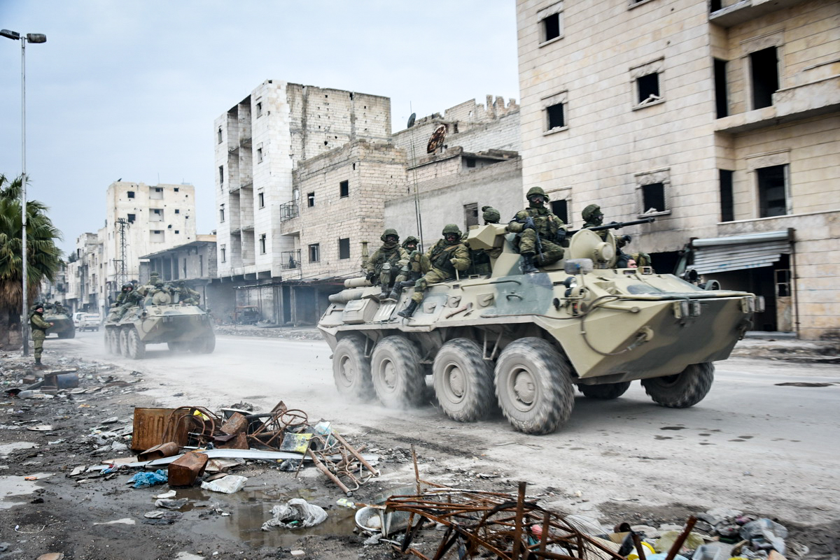 Работа сапёров Международного противоминного центра Министерства обороны России в Алеппо (Сирия)